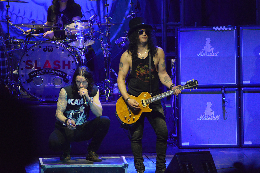 Quito, 11 mar (ANDES).- Slash junto a Myles Kennedy y The Conspirators se presentaron en el ágora CCE brindando un concierto lleno de emociones, Slash interpretó 4 canciones de su ex banda Guns n' Roses. Fotografías: Carlos Rodríguez/ANDES